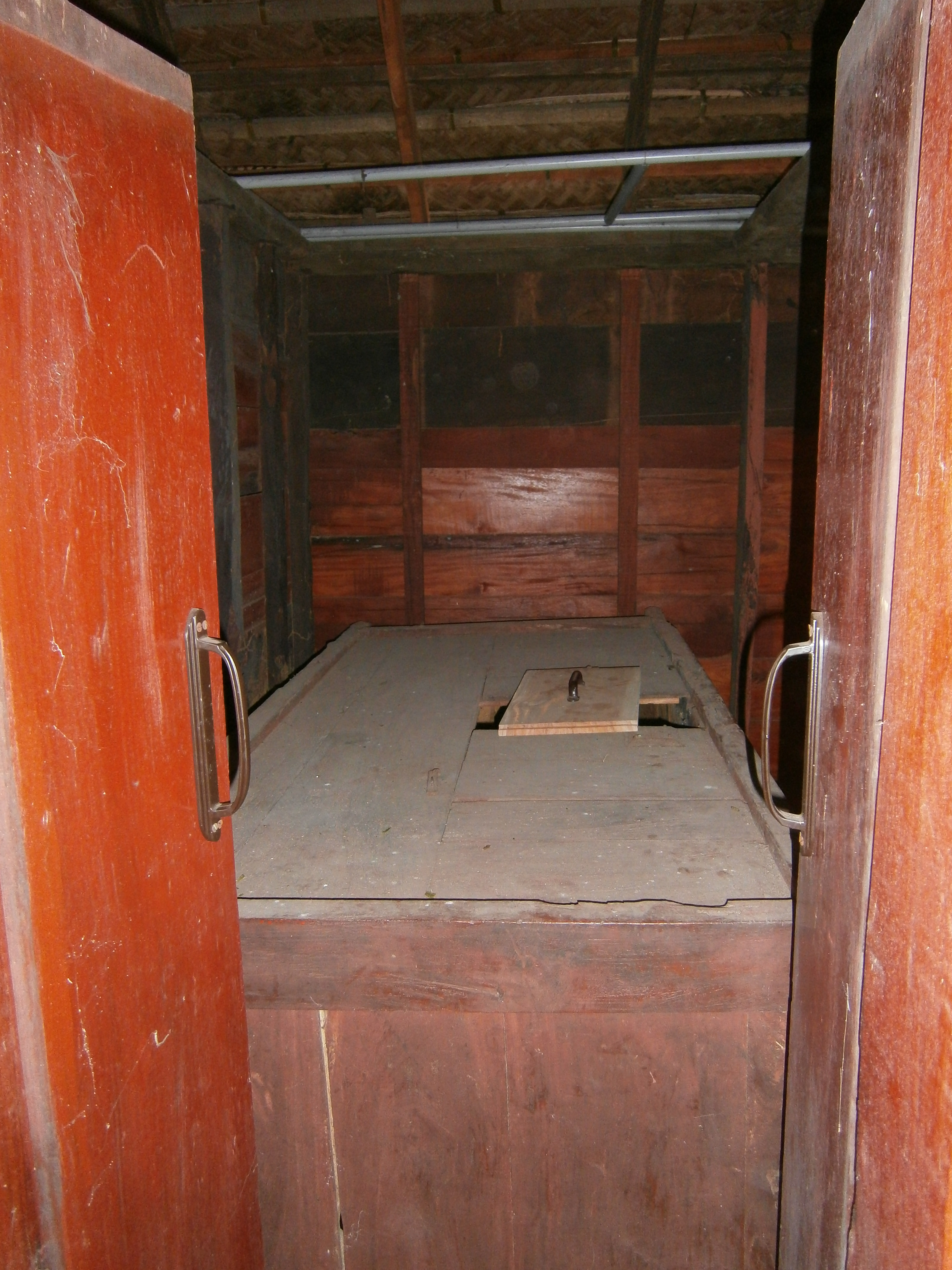 മരണ സമയത്ത് പി. കൃഷ്ണപിള്ള എഴുത്തുമേശയായി ഉപയോഗിച്ചിരുന്ന പത്തായം